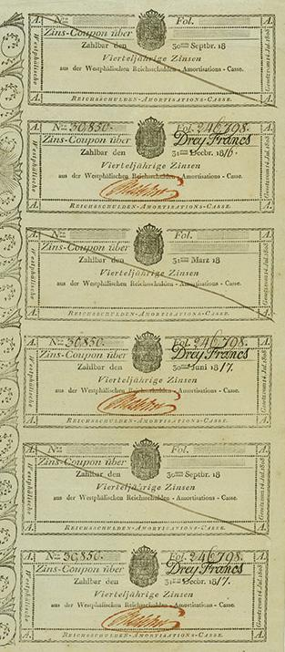 Kupon der Obligation des Königreichs Westphalen aus dem Jahr 1808